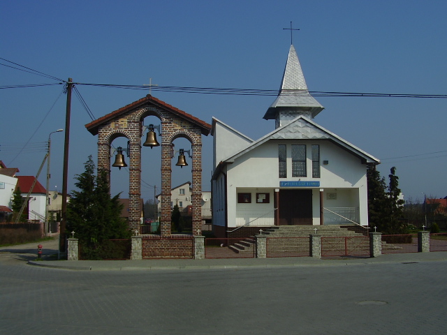 Kościół we wsi Płoty w woj. lubuskim